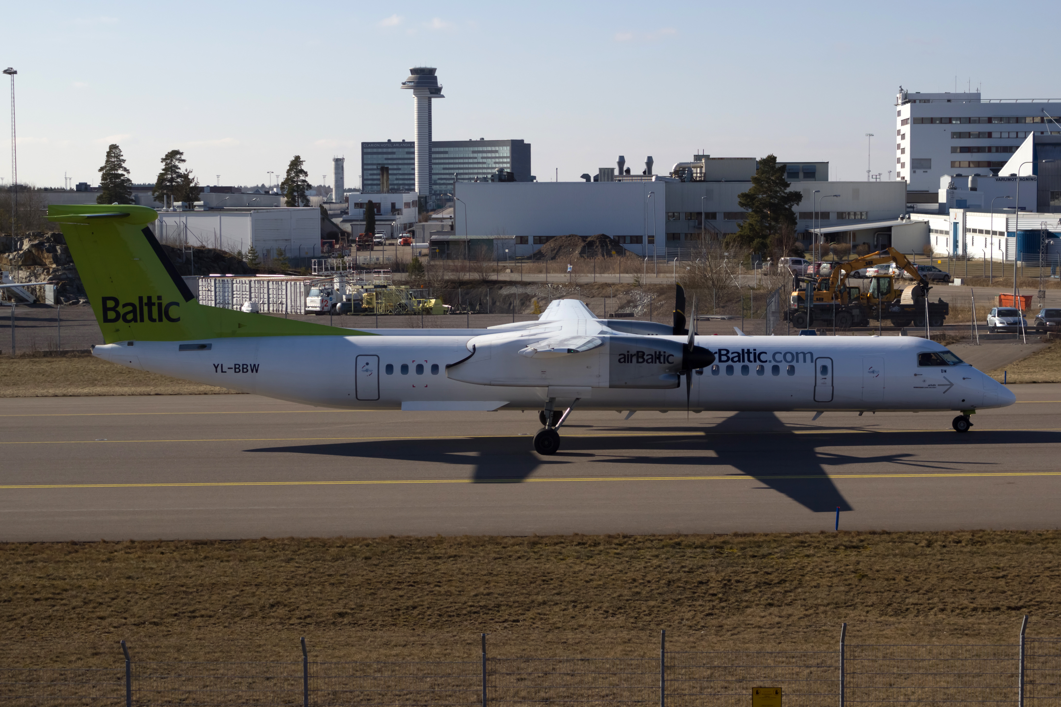 DHC-8-400 de airBaltic no aeroporto de Estocolmo-Arlanda.